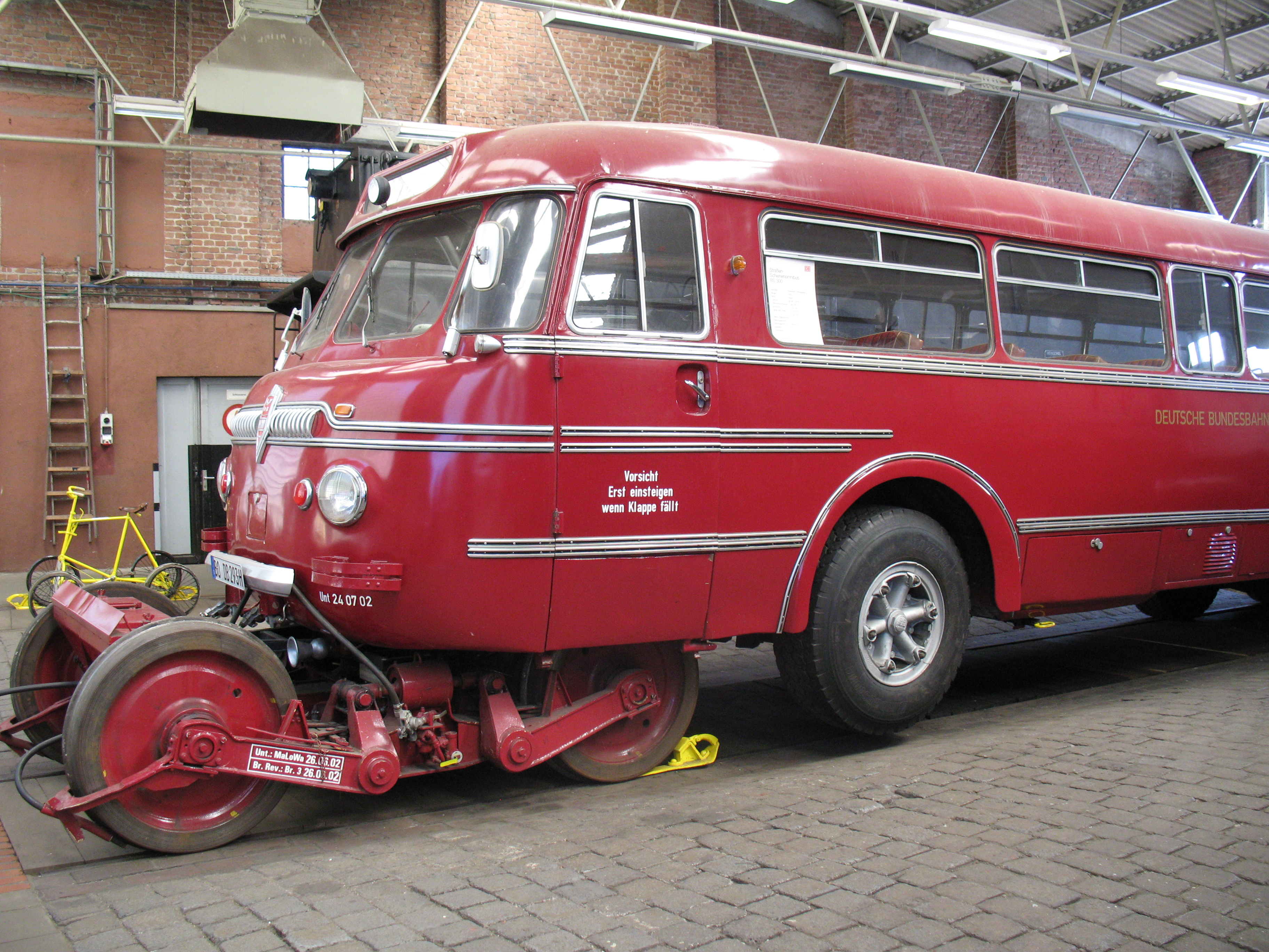 Straßen-Schienen-Bus der Deutschen Bundesbahn; Bauart BS 300, Baujahr 1953, im Einsatz bis 1964; Eisenbahnmuseum Bochum-Dahlhausen